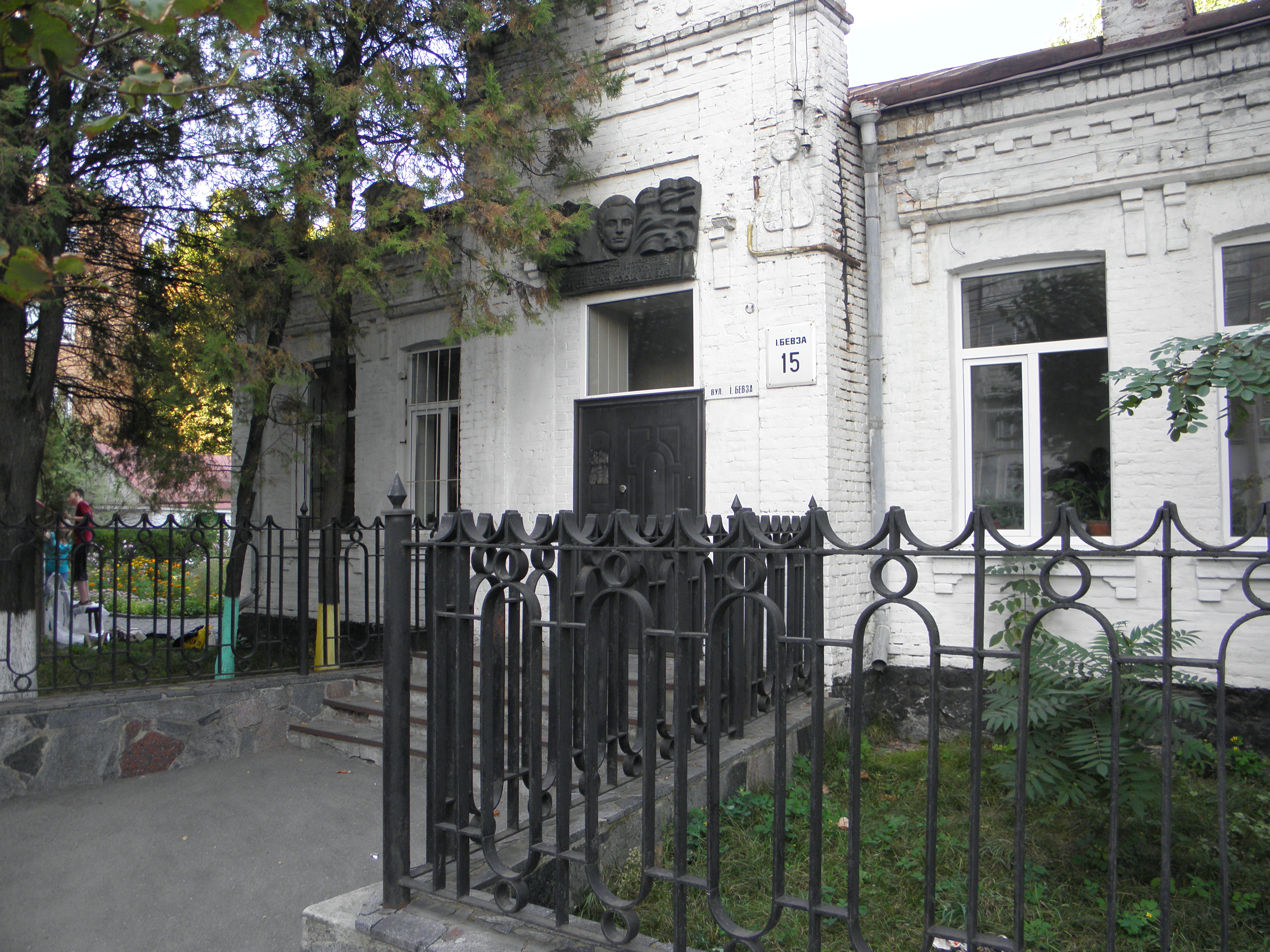 Вінниця, вулиця Бевза, 15. Будинок, в якому знаходилась штаб-квартира підпільного партійного центру.